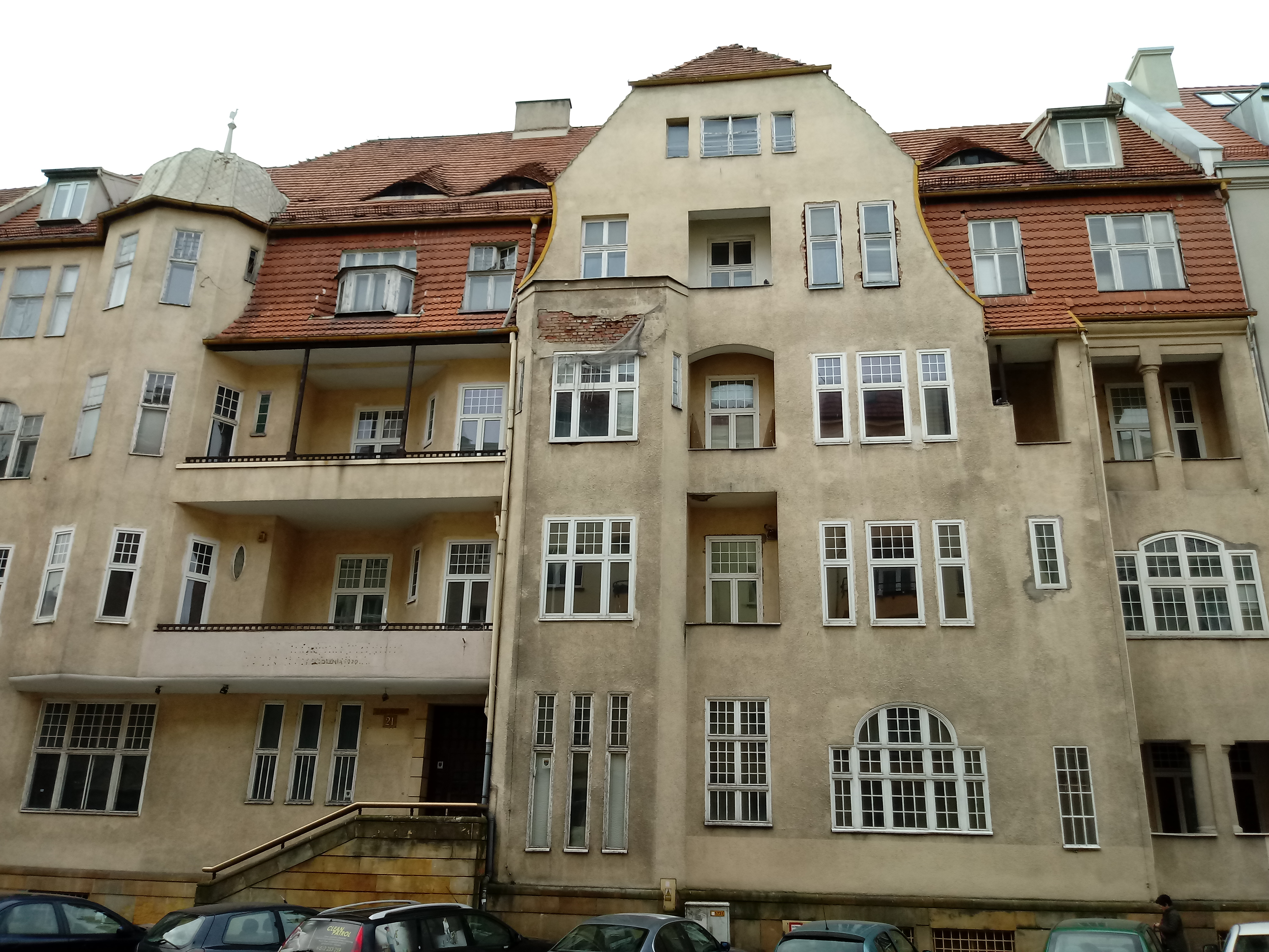 Budynek dawnego Kina Miniaturka przy ul. Chełmońskiego 21